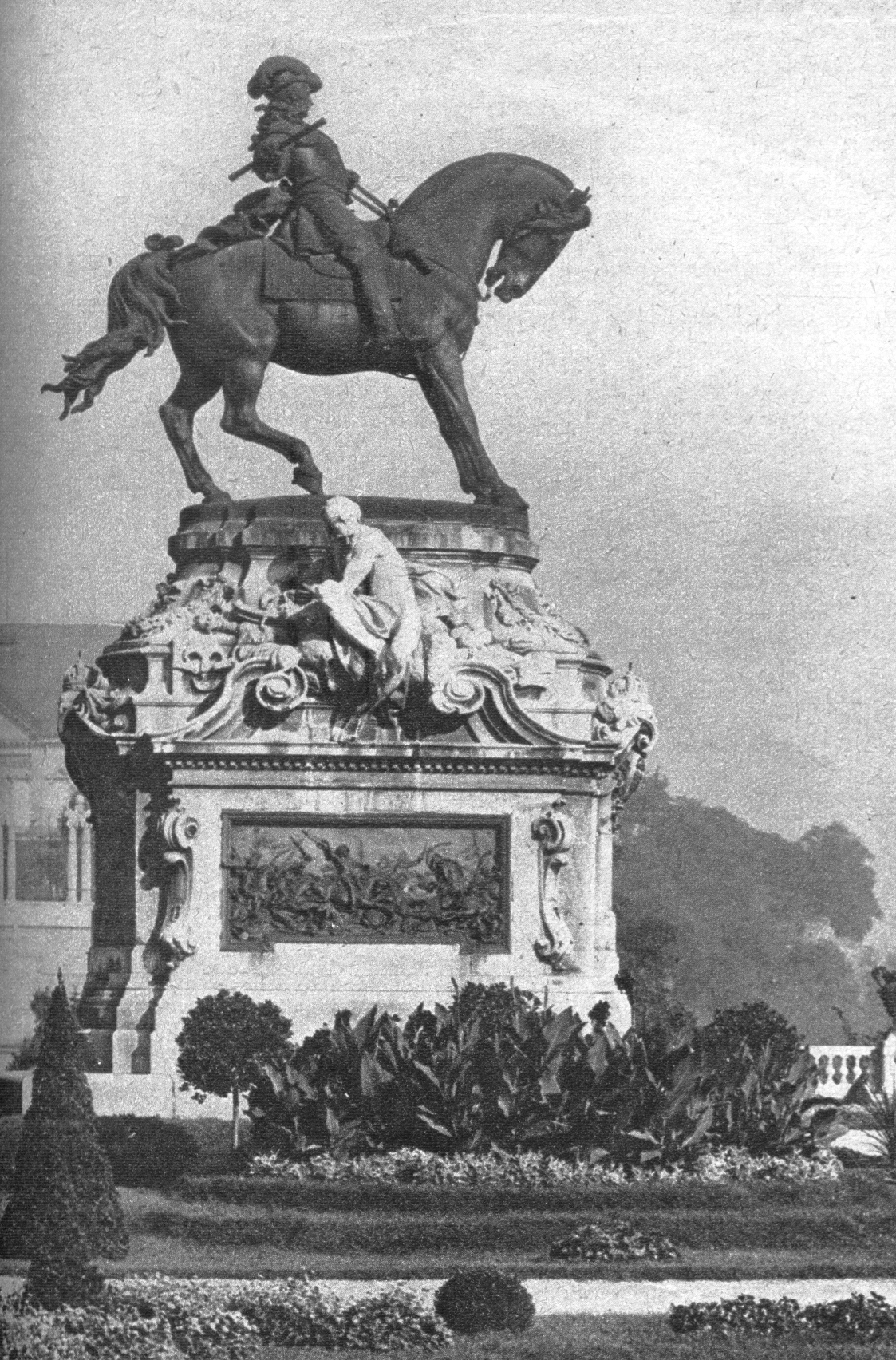 Savoyai Eugen lovasszobra a Budavári Palotában. Róna József alkotása.